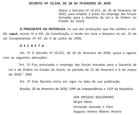 Decreto nº 10.259, de 28 de fevereiro de 2020 que altera o Decreto nº 10.251, de 20 de fevereiro de 2020, para ampliar o prazo do emprego das Forças Armadas para a Garantia da Lei e da Ordem no Estado do Ceará.